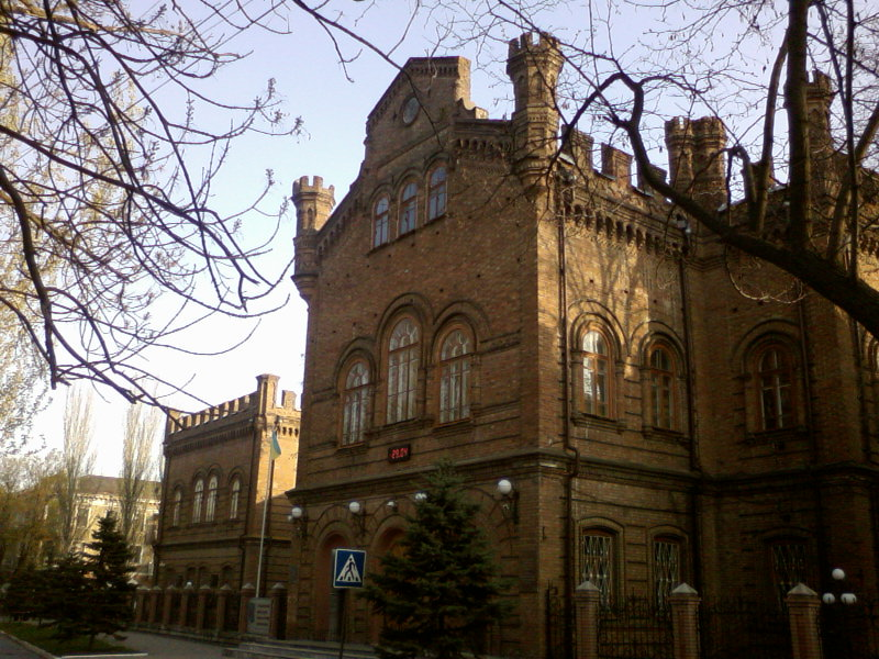 Бердянський державний педагогічний університет